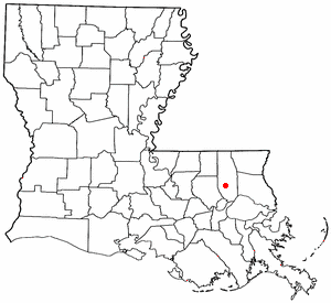 Volapük: Topam in tat: Louisiana.